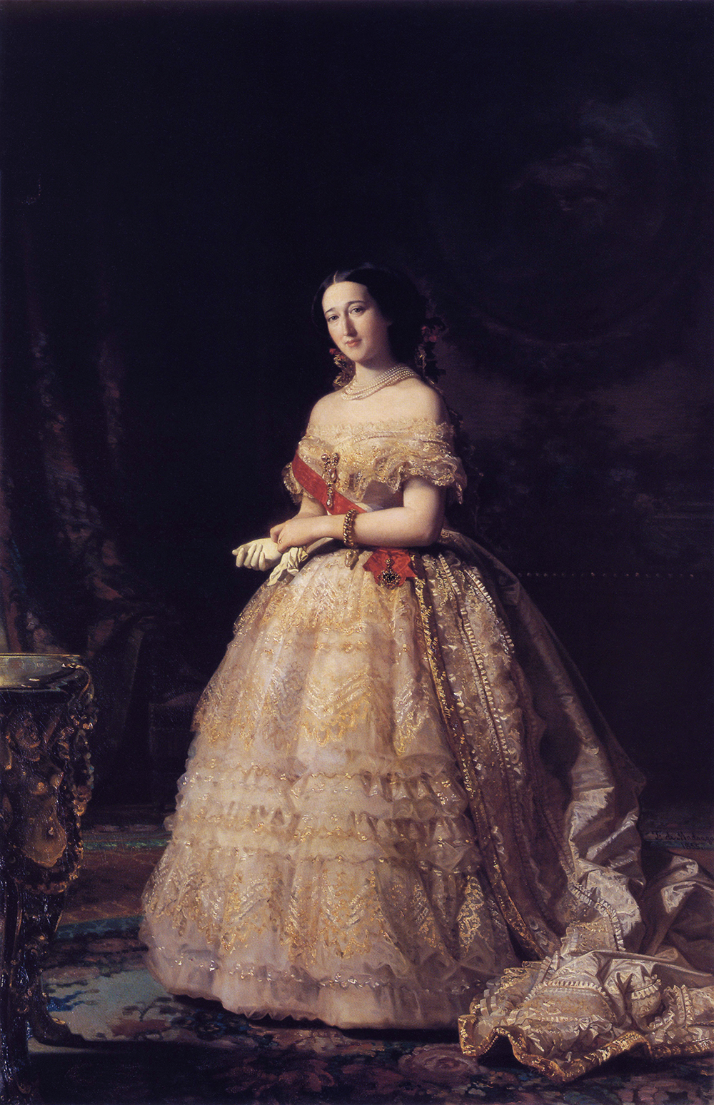 Retrato de la aristócrata española María Francisca de Sales Portocarrero (1825-1860), duquesa de Alba y Grande de España.